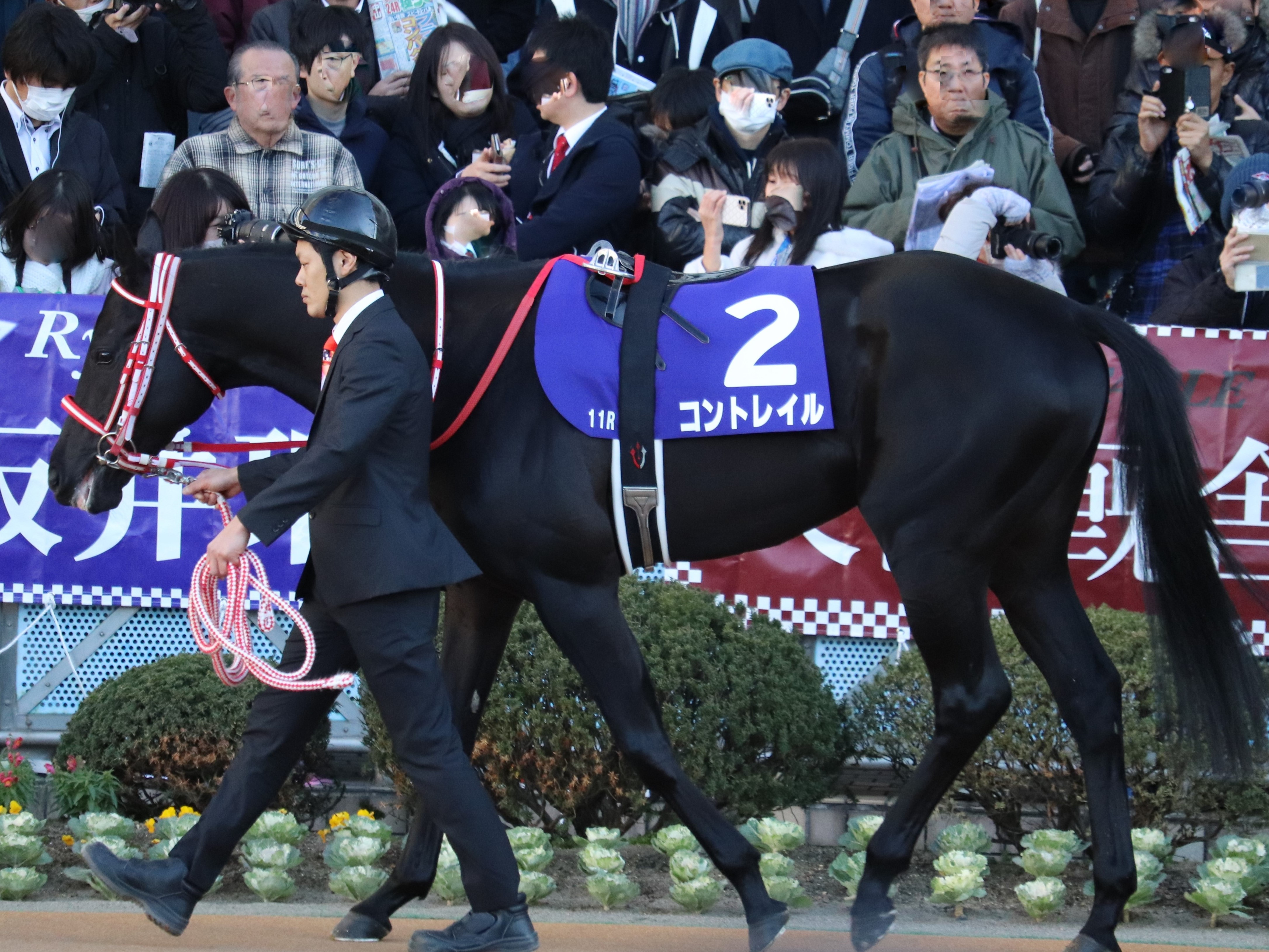 中山競馬場のパドックを周回するコントレイル（ホープフルステークス）